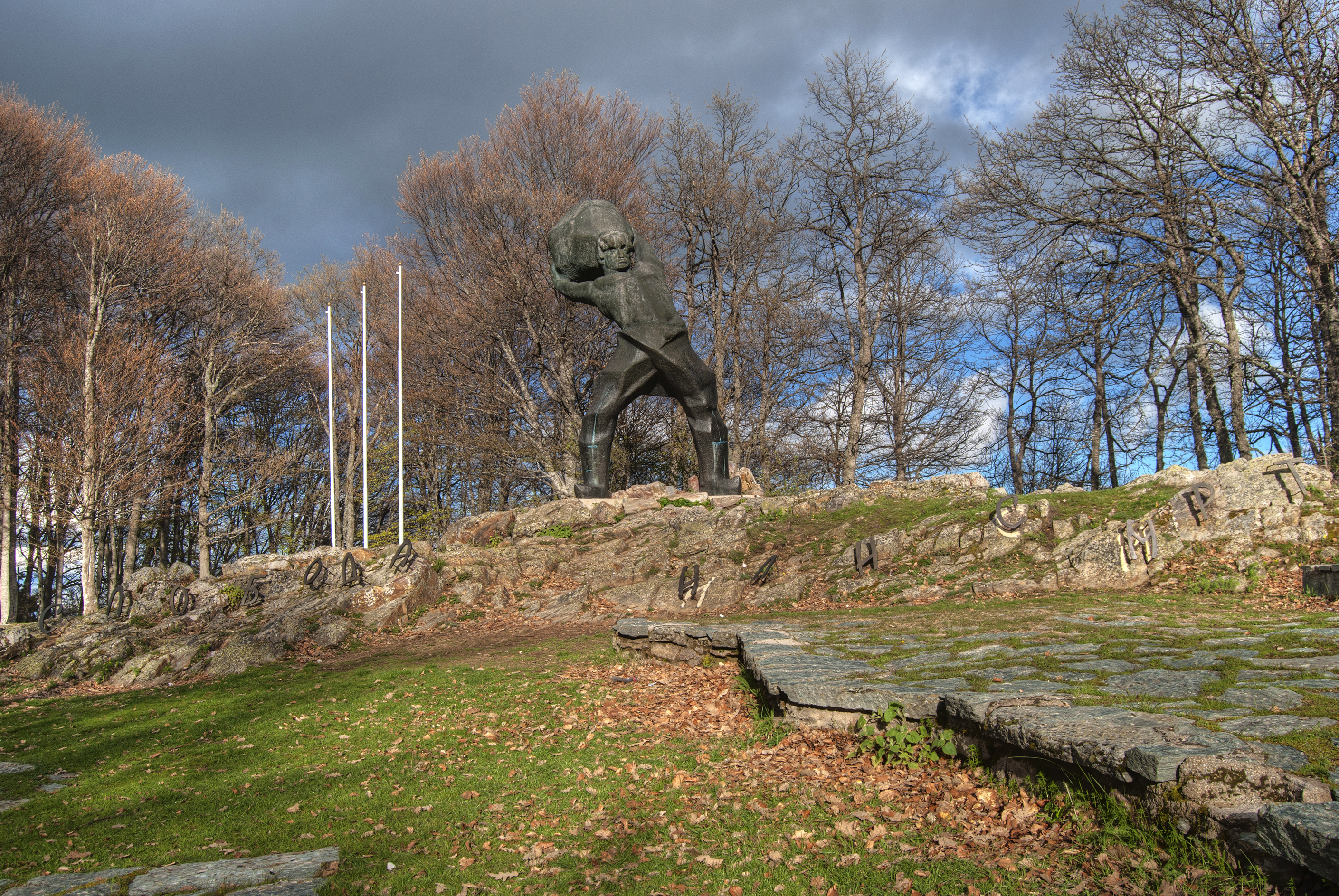 Мечкин Камен, Крушево